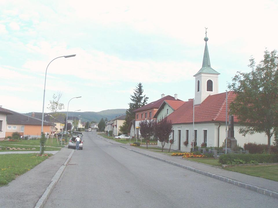 Günseck, Burgenland, Austria